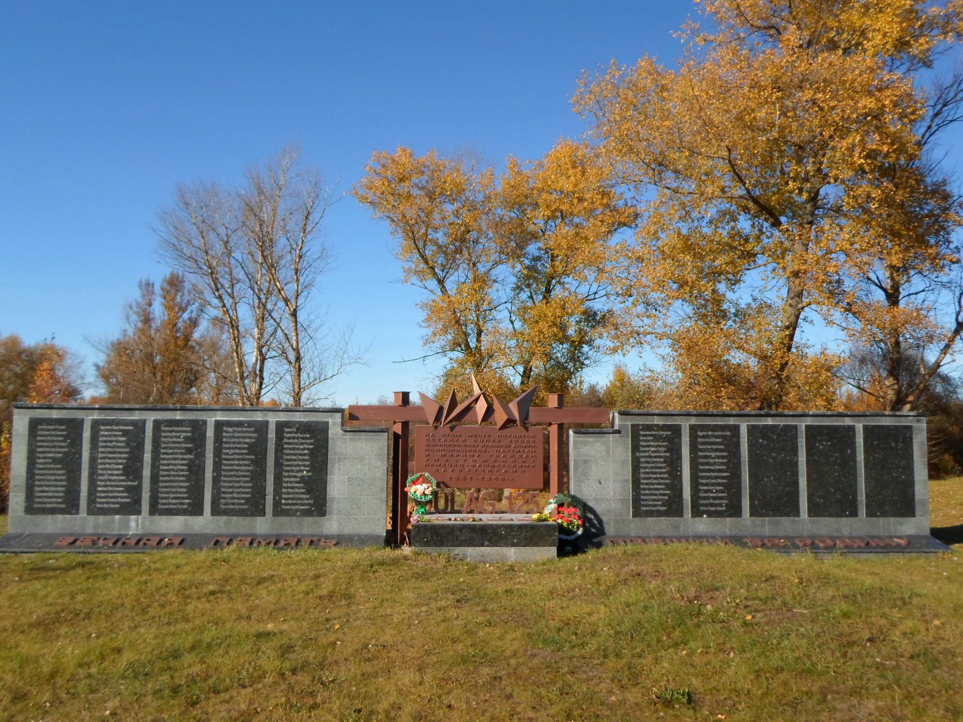 Мемориал "Урочище Пески"